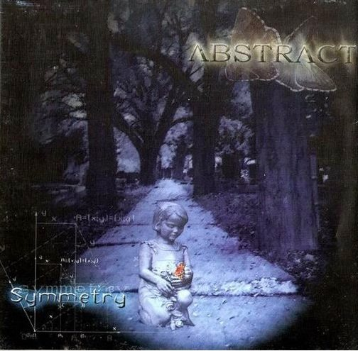 Predná strana obalu CD albumu kapely Abstract z roku 2002 s názvom Symmetry.